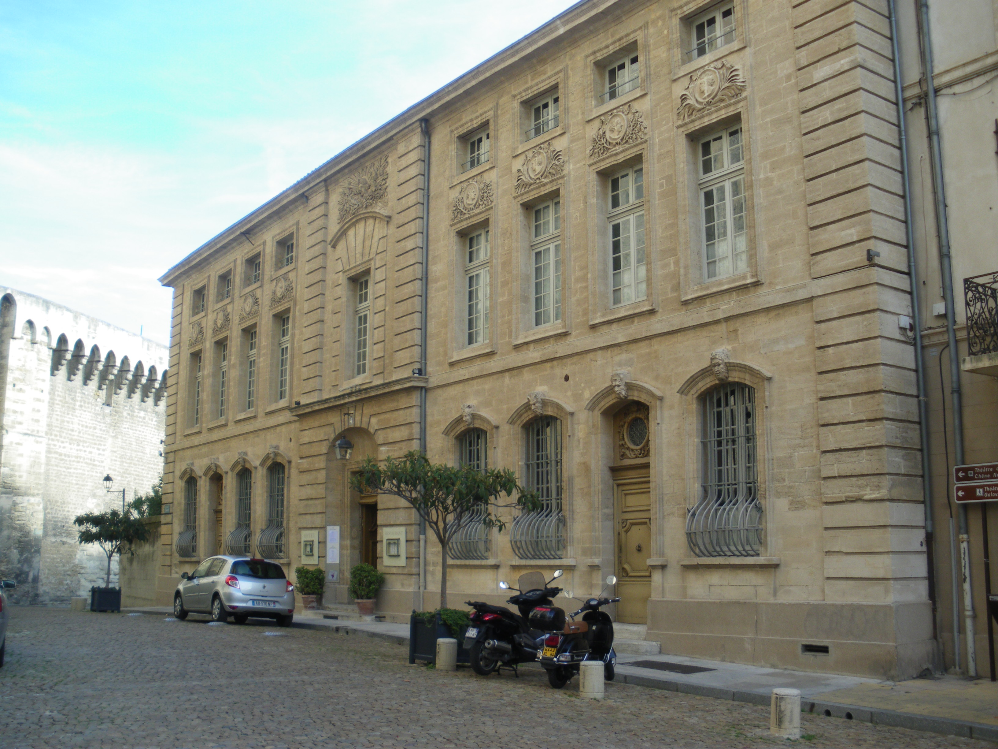 Hotel de l'Amirande, derrière le palais des papes à Avignon